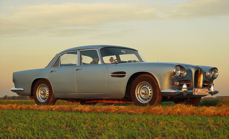 Lagonda Rapide 1964